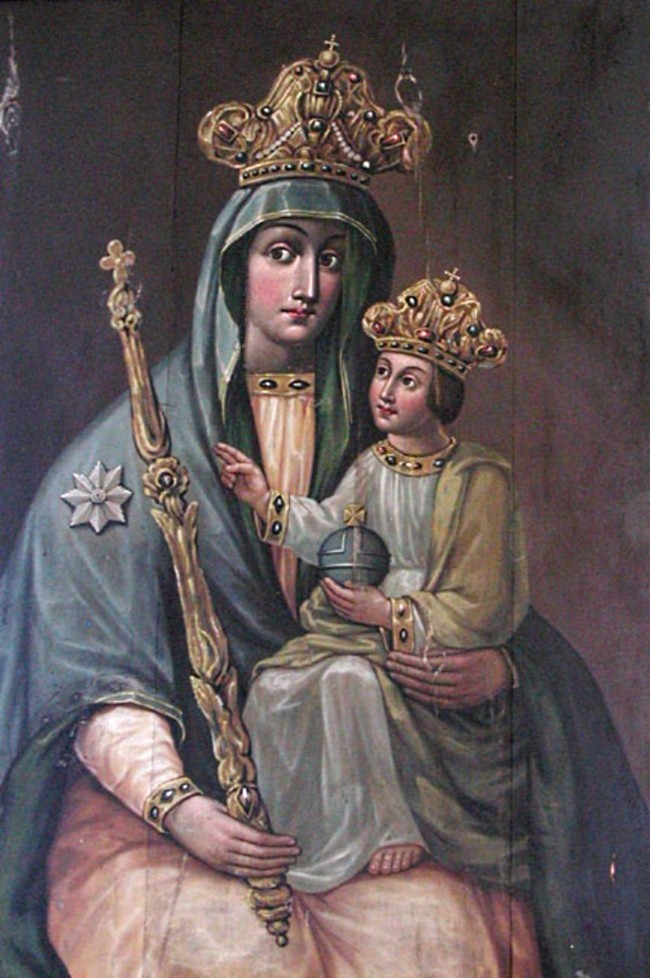 Абраз XIX ст., вёска Новы Двор Гродзенскай вобл